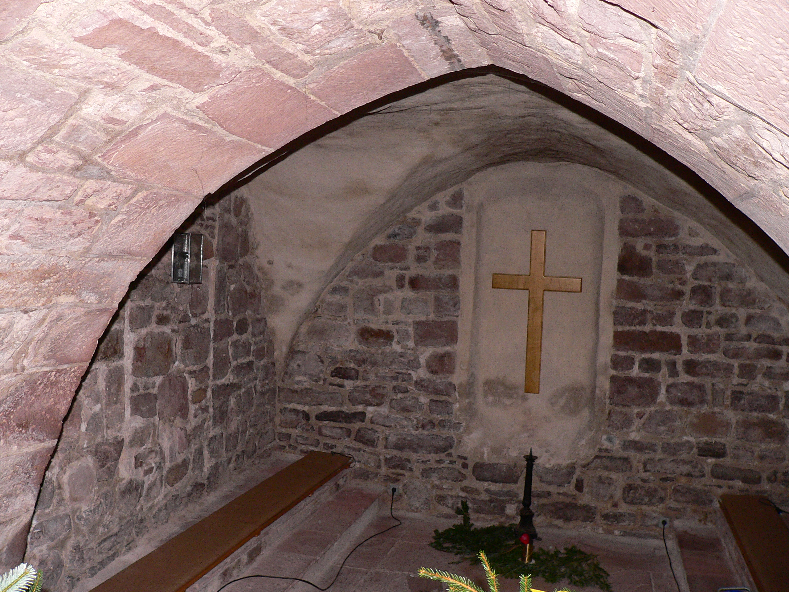 Evangelische Kirche St. Laurentius in Dassel, Niedersachsen, Deutschland - Turmkapelle